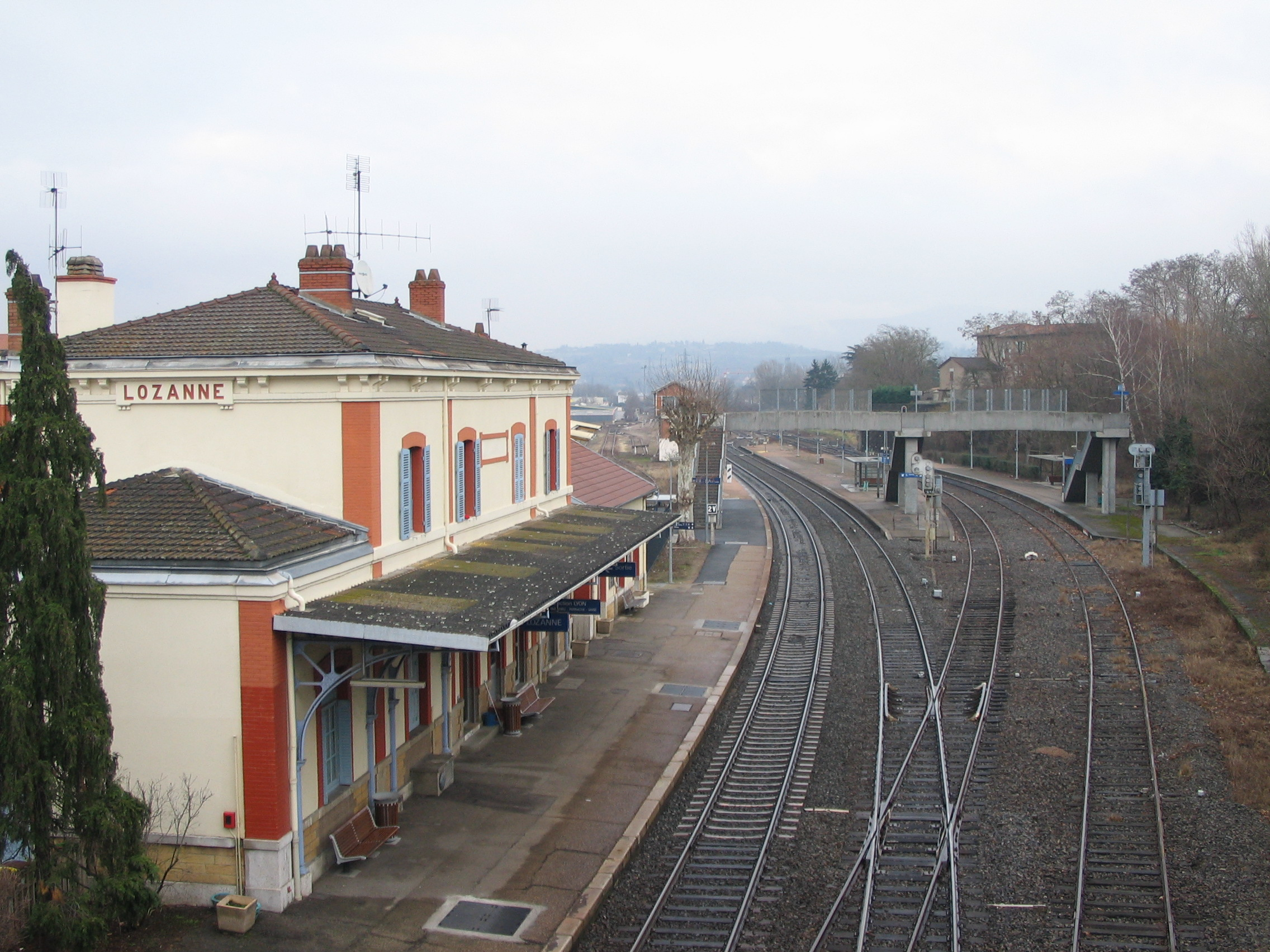 Gare de Lozanne (Rhône) - depuis D30, en venant de La Tour-de-Salvagny.